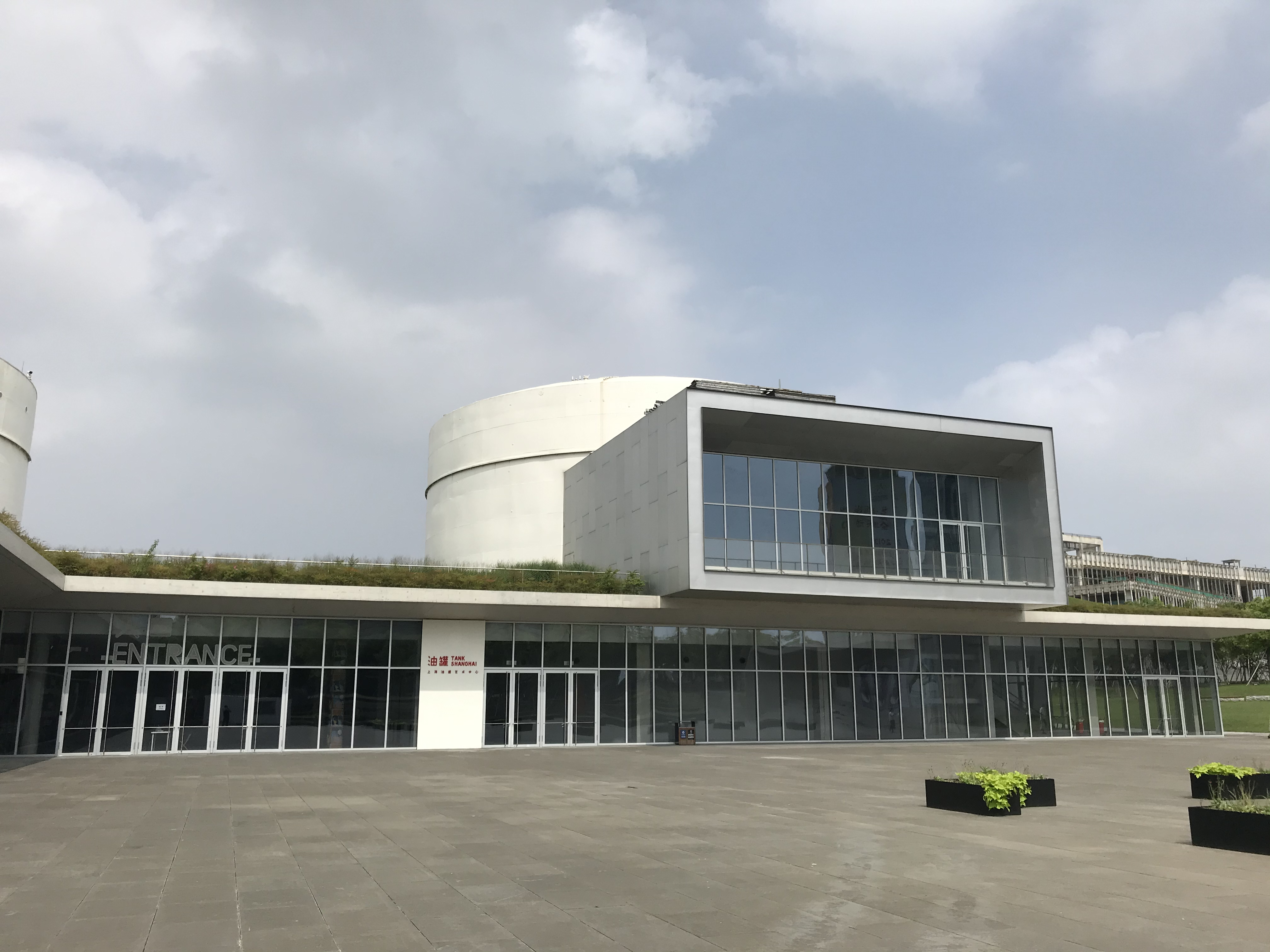 上海油罐艺术中心 2020